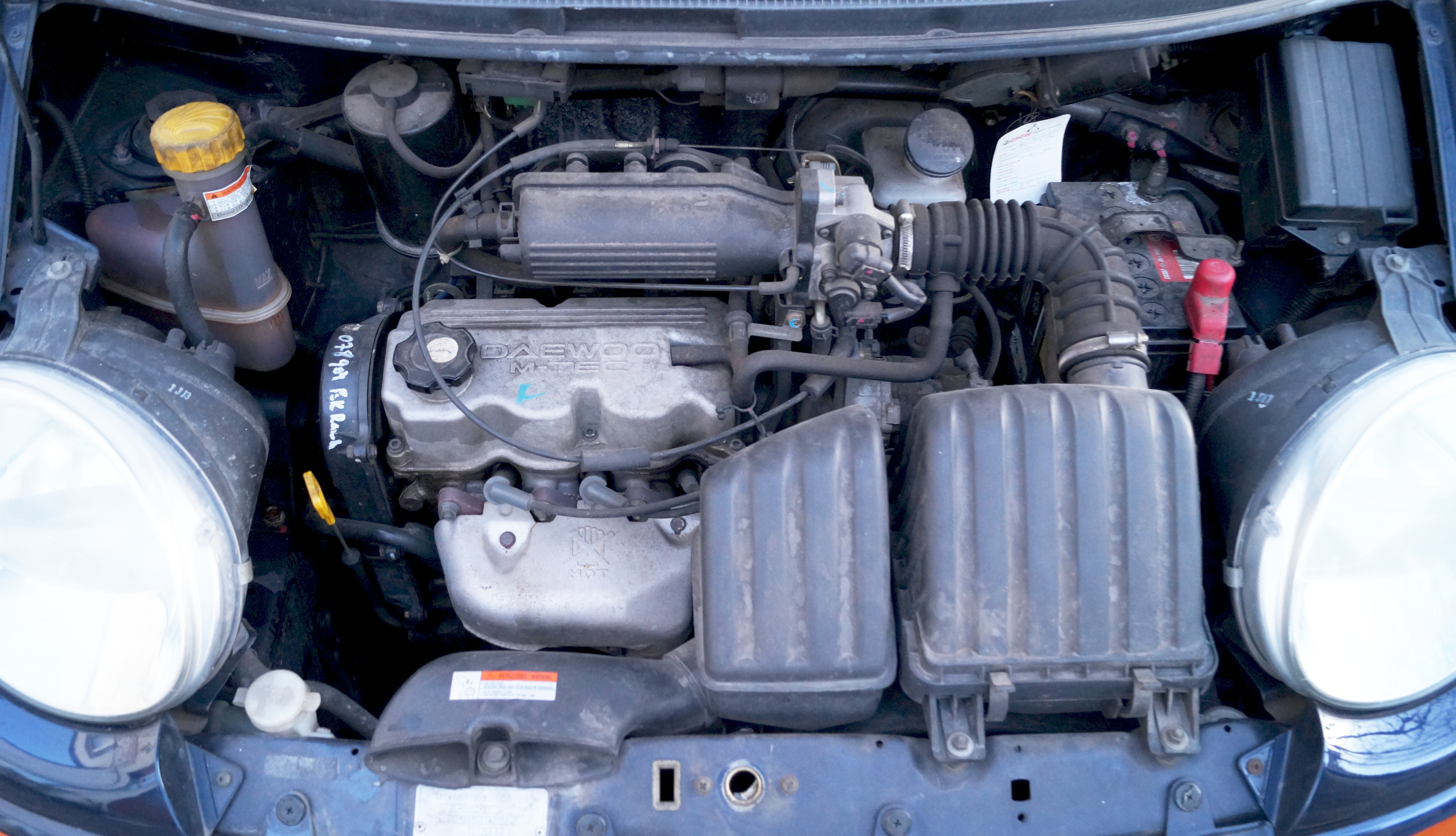 Silnik M-Tec 0,8 l zainstalowany w aucie Daewoo Matiz